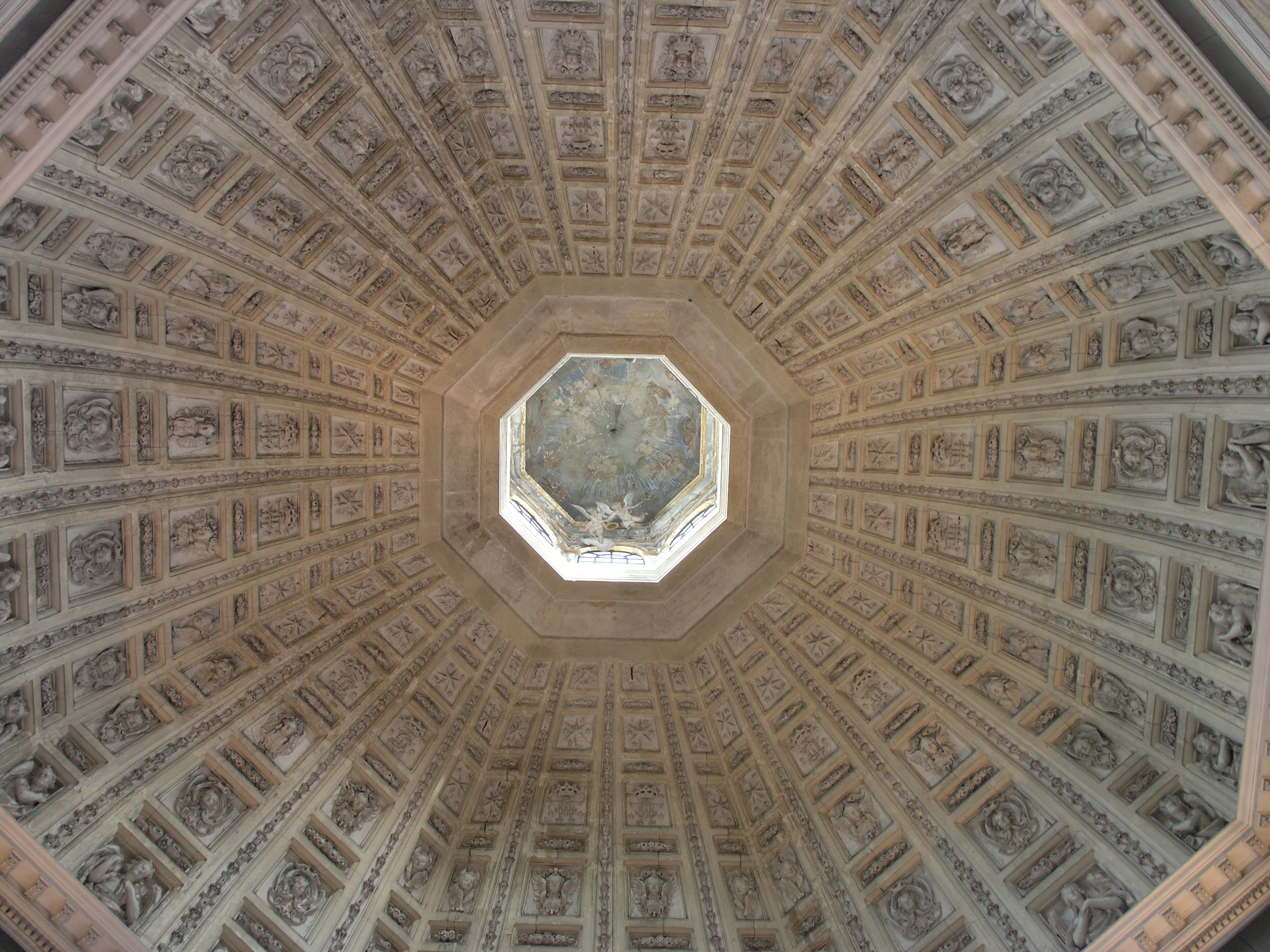 Coupole octogonale de la chapelle funéraire des ducs de Lorraine (1609-1632), dans l'église des Cordeliers, Nancy.